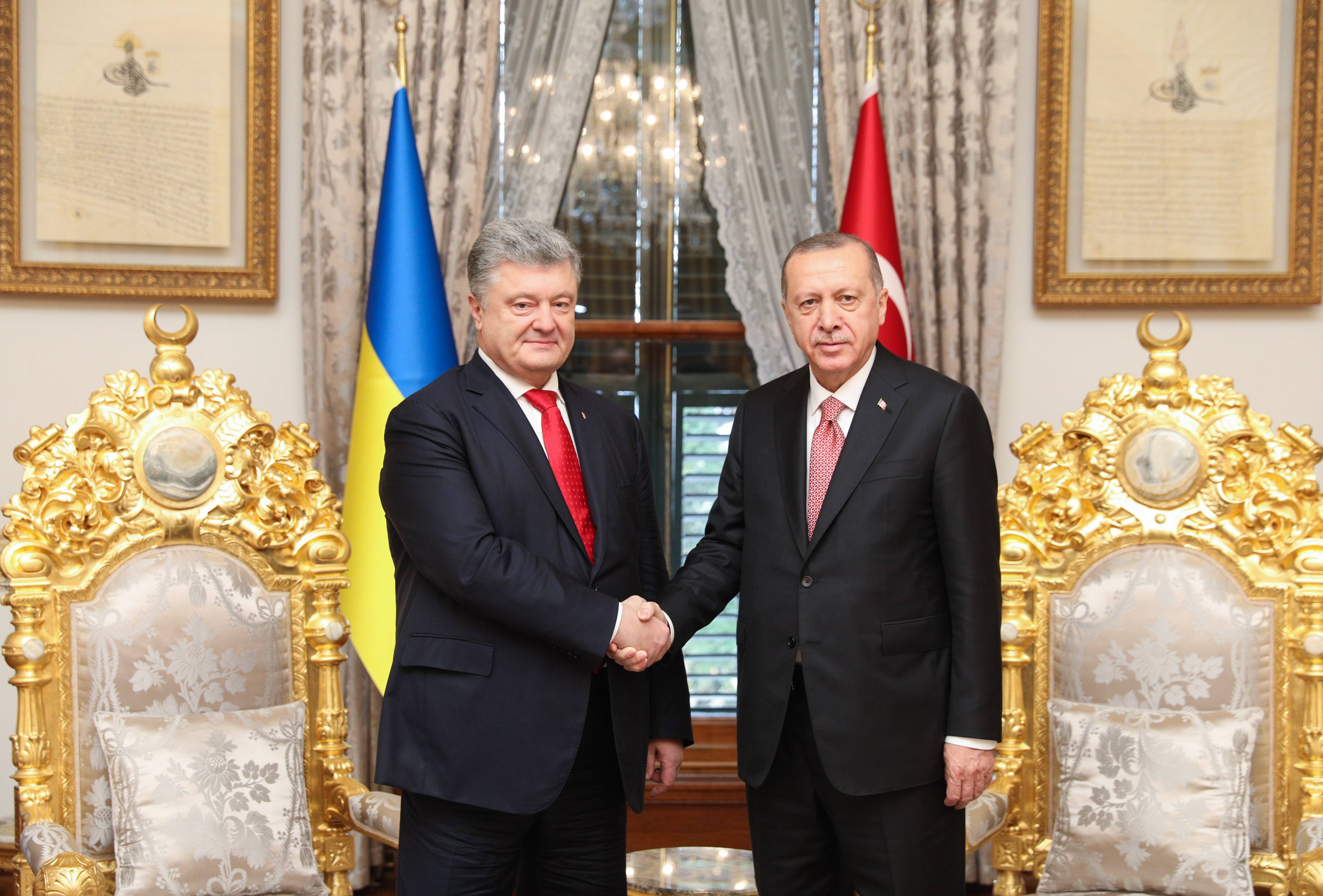 Ukrayna Devlet Başkanı Petro Poroşenko Türkiye Cumhurbaşkanı Recep Tayyip Erdoğan ile görüşürken